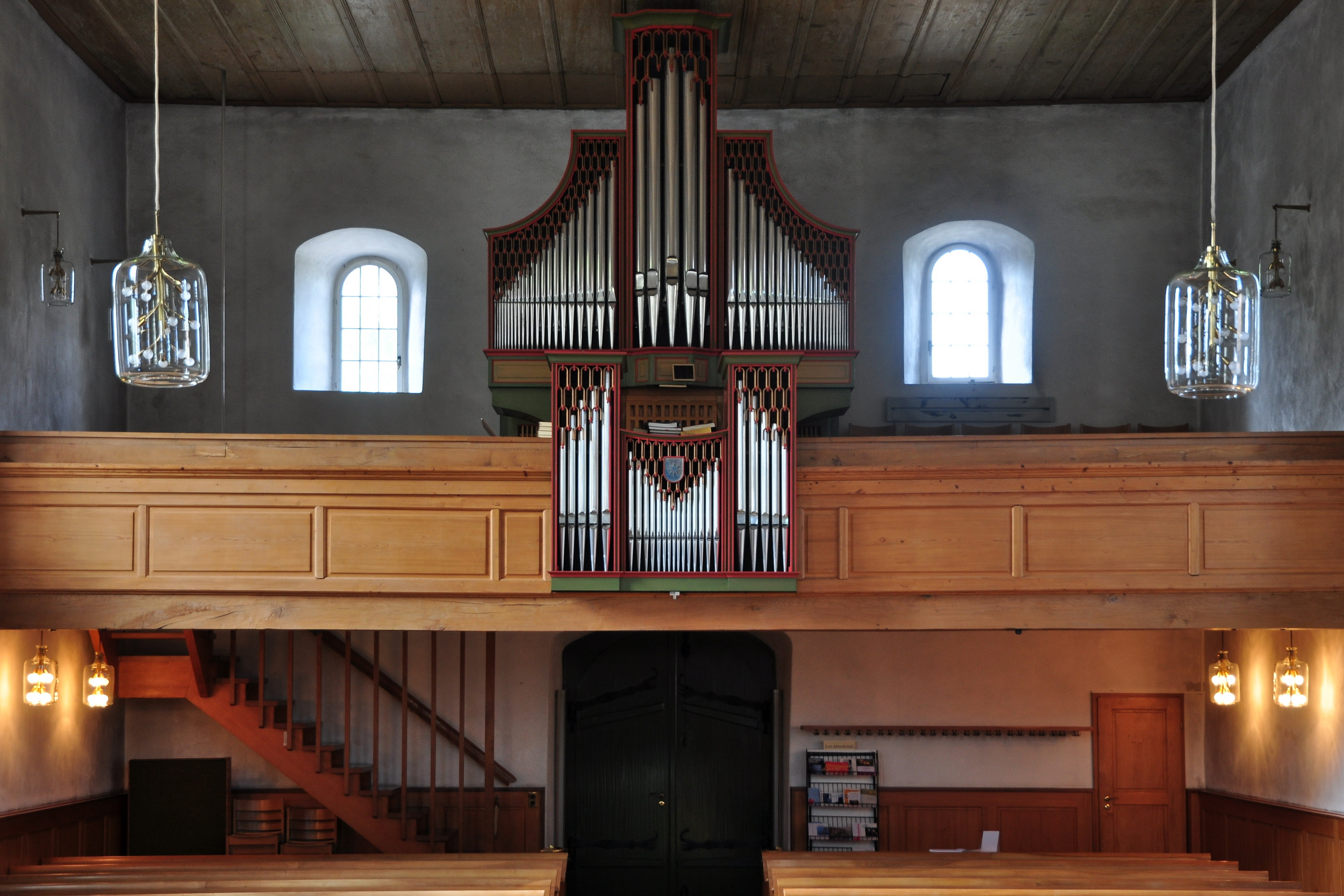 Kirchenbezirk, Büelstrasse 17 in Weiach (Switzerland)